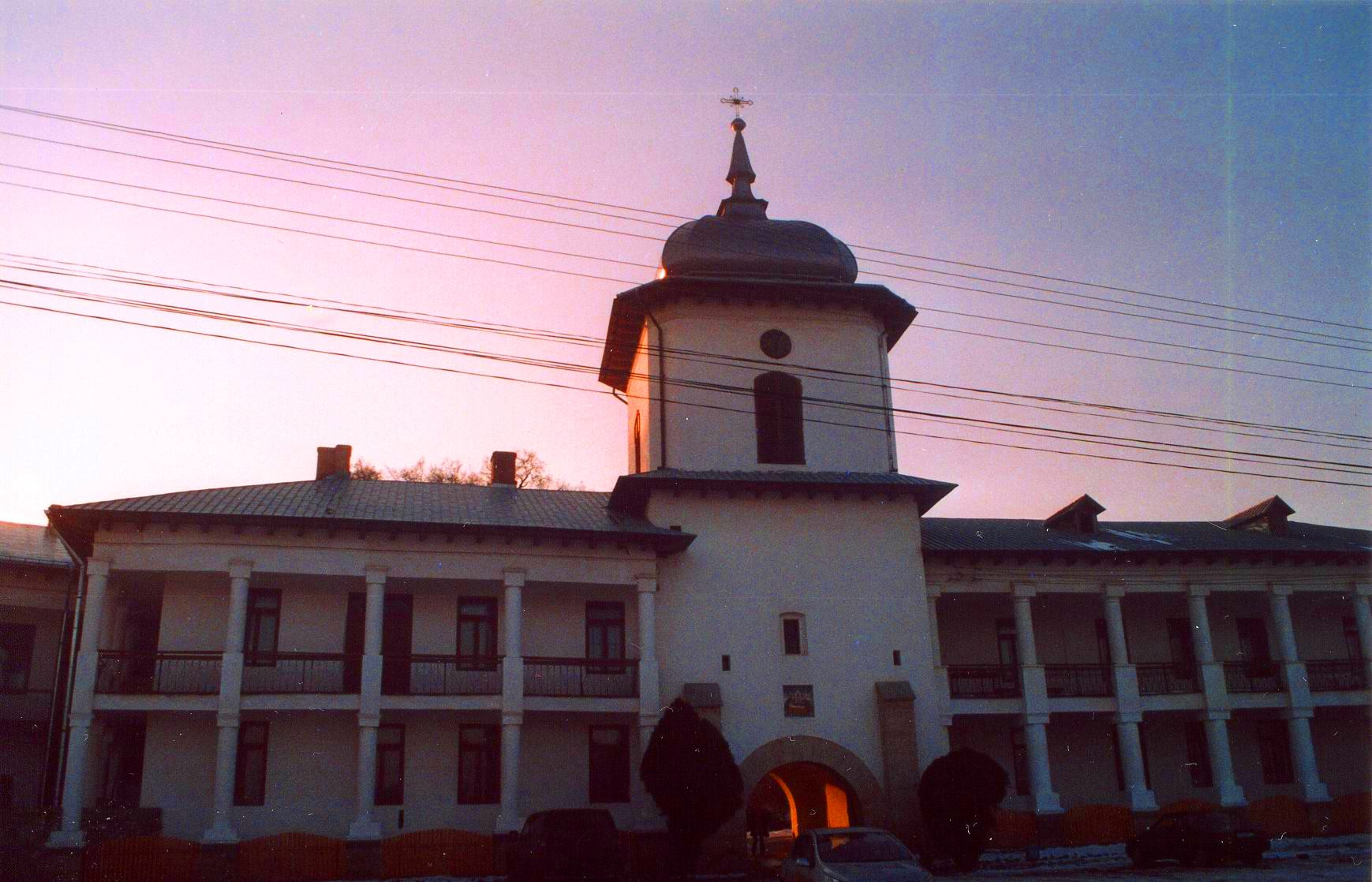 Mănăstirea Văratic 02